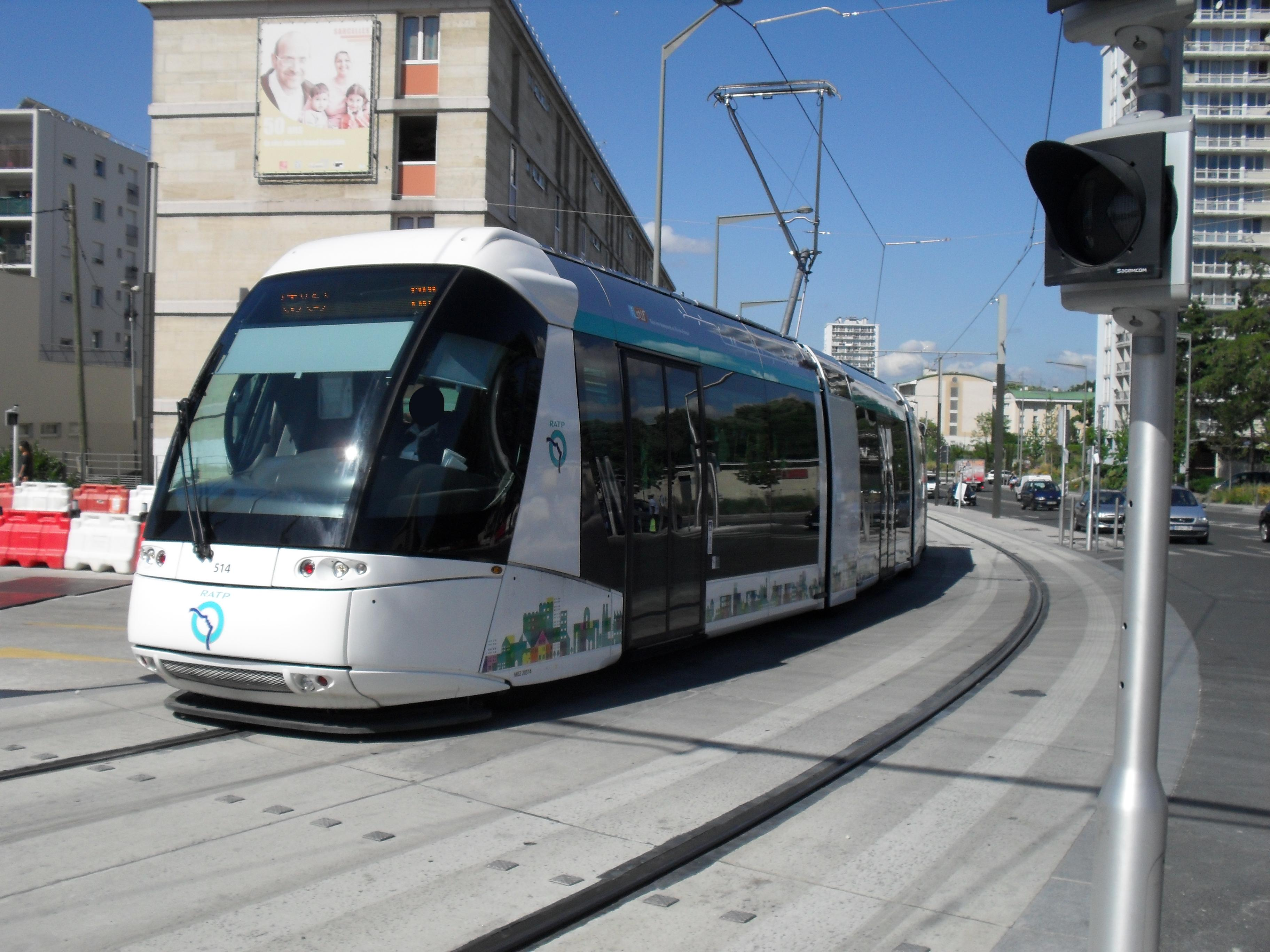 Une rame Translohr de la ligne T5 arrivant à la station terminus "Garges-Sarcelles".